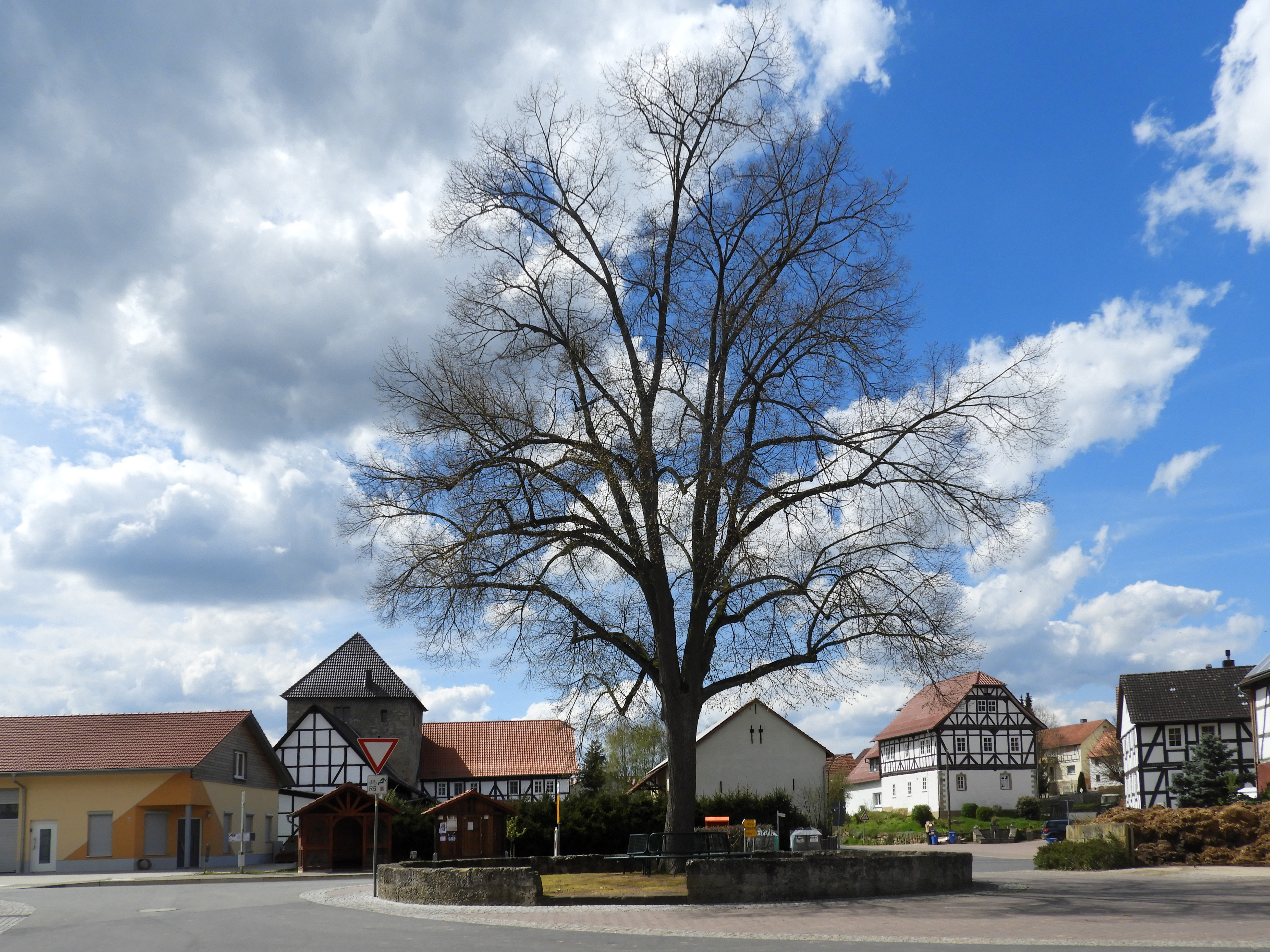 Der um 1750 angelegte Anger liegt am Fuße des Kirchbergs, im Kreuzungsbereich mehrerer Straßen. Auf dem kreisrunden ummauerten Platz steht eine rund 100-jährige Linde mit einer runden Bank um ihren Stamm. In unmittelbarer Nachbarschaft des Dorfangers stehen mehrere denkmalgeschützte Gebäude. Als frühere Gerichts- und Versammlungsstätte ist der Anger aus orts- und sozialgeschichtlichen Gründen ein erhaltenswertes Kulturdenkmal.